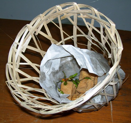 Tahu sumedang inside its rattan bracket